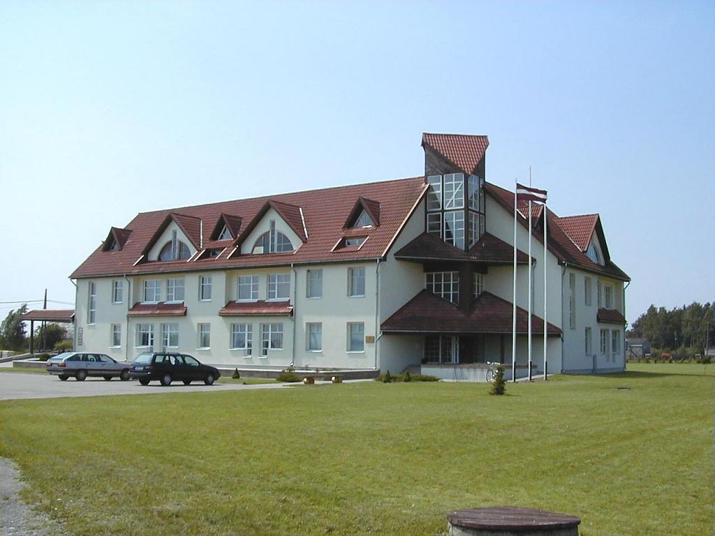 Smārdes pagastnams. 2002-07-11